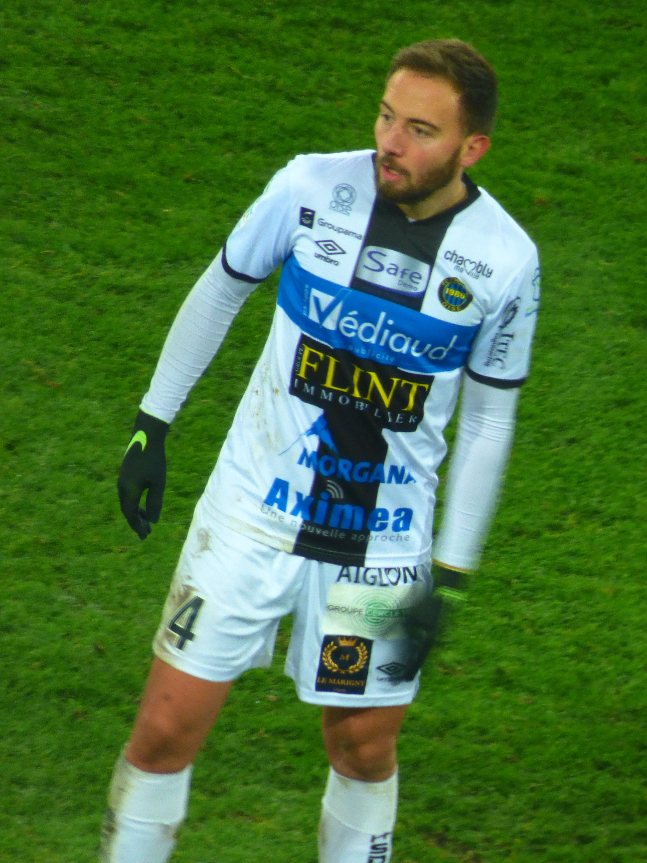 Sébastien Flochon lors du match Lens - Chambly, comptant pour la dix-septième journée du championnat de France de football de Ligue 2 2019-2020, le 3 décembre 2019.